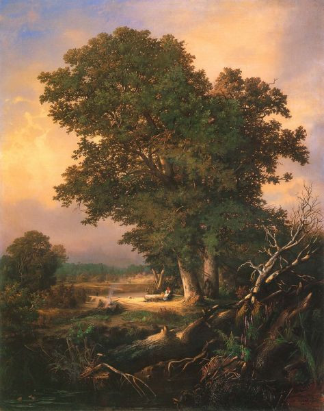 И. Горавский. На берегах Березины. 1857. Холст, масло, 127 х 99